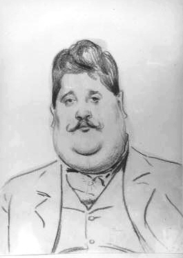 Joseph Urban. Zeichnung von R. Swoboda, um 1900